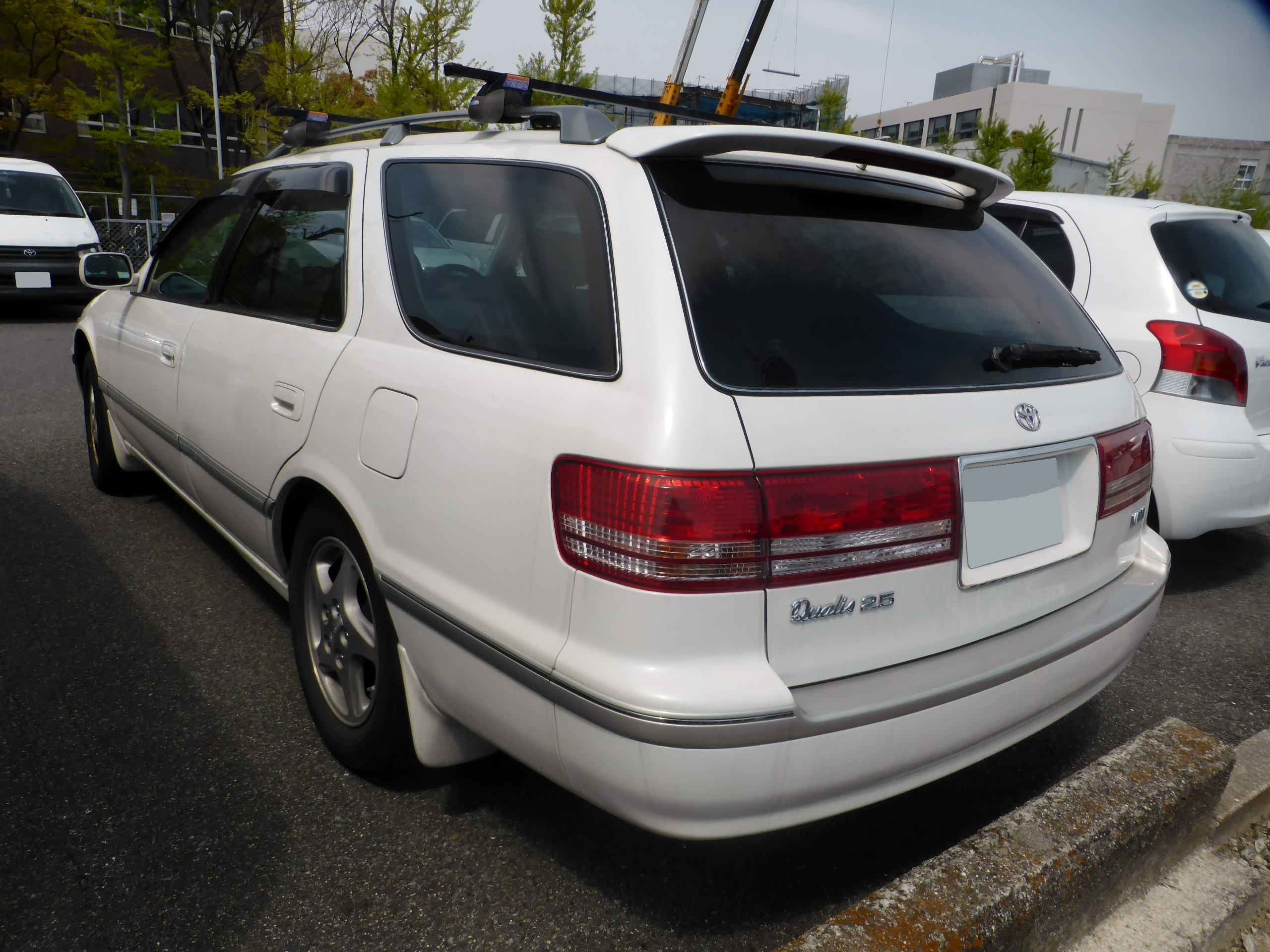 MCV21W型トヨタ・マークII 2.5クオリスをリアから撮影。